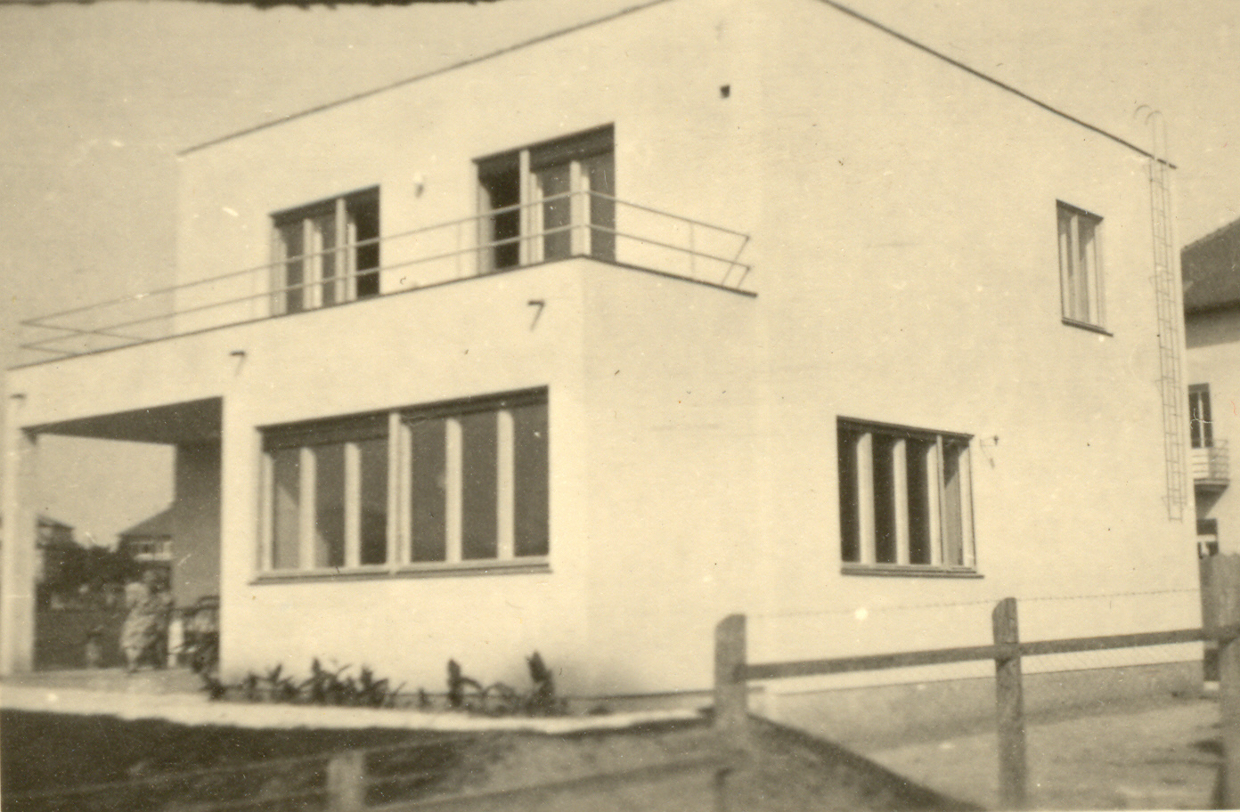 Primjer familijarne vile - utjecaj Bauhausa